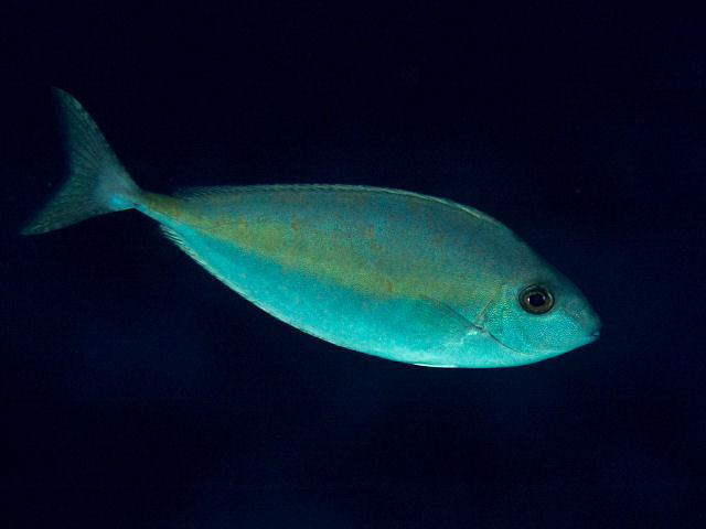 ボウズハギ Naso thynnoides